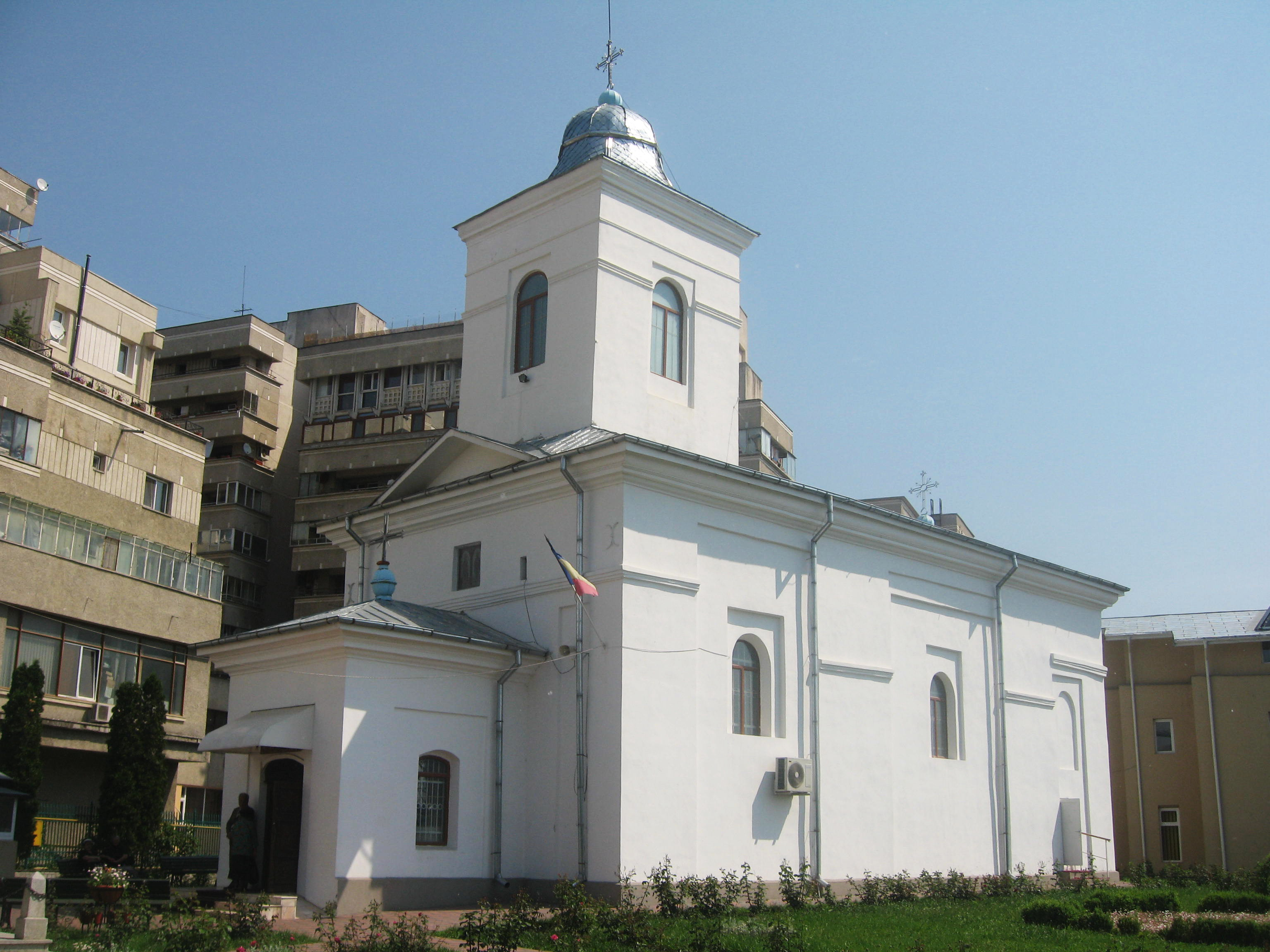 Biserica Sf. Lazăr din Iaşi